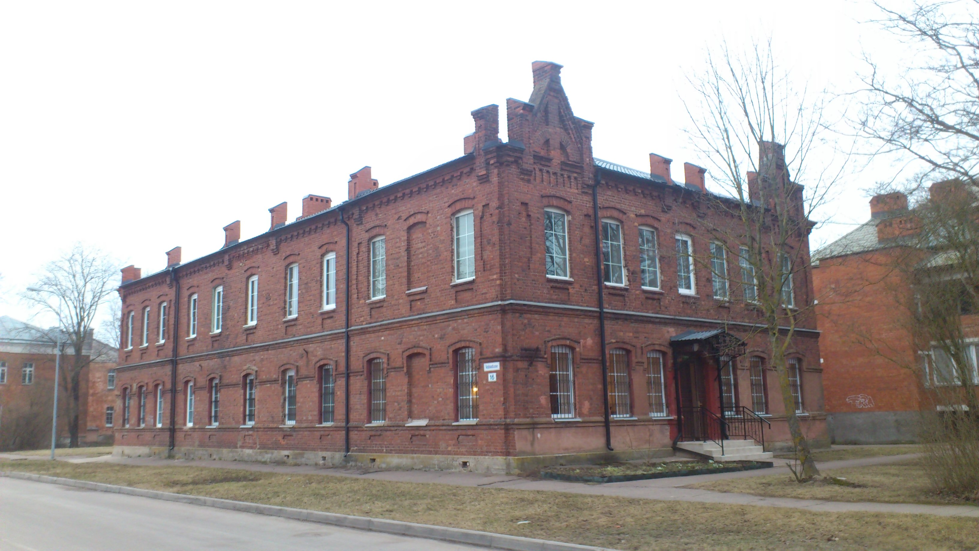 Hoone aadressil Vabaduse 16, Narva. Vaade Vabaduse tänavast